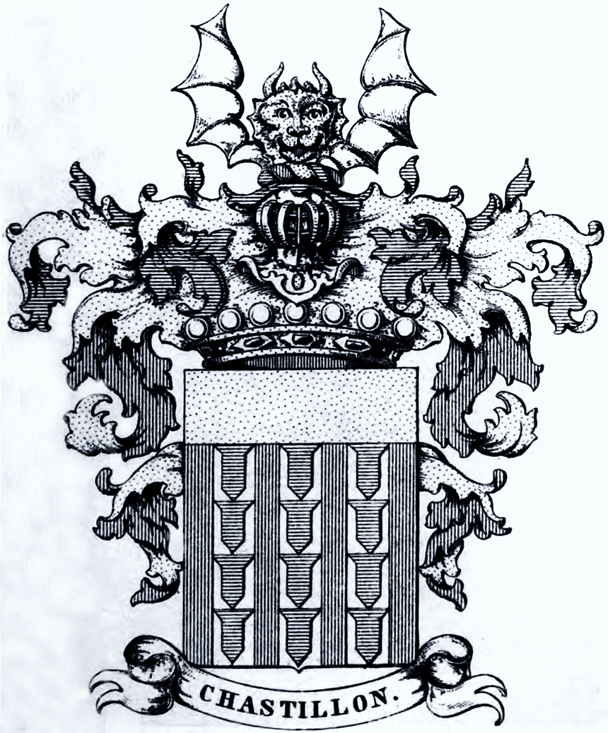 Wappen der Freiherrn von Beaulieu